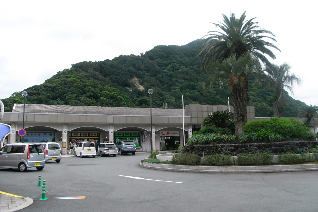 伊豆急下田駅。後ろの山は地図には特に名前が出ていないが、頂上には浅間神社がある、らしい。